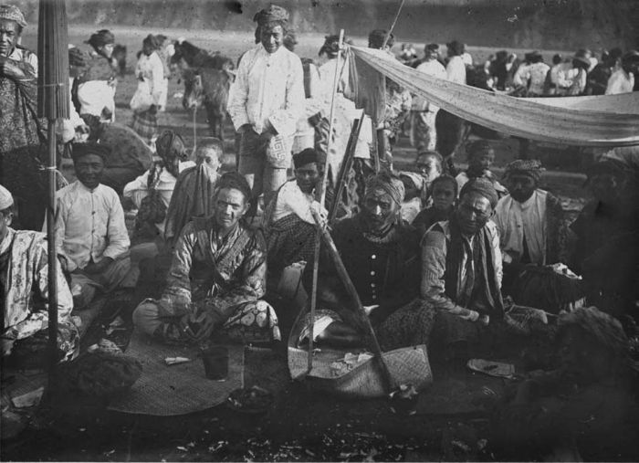 Foto. Viering van het Bromofeest in de Zandzee, op de voorgrond Zodiakbekers voor plengoffers